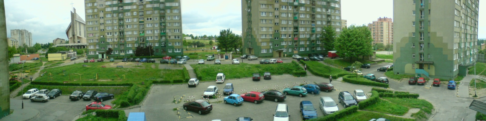 Bloki na osiedlu Błeszno widziane z ulicy Boh. Katynia. w Częstochowie